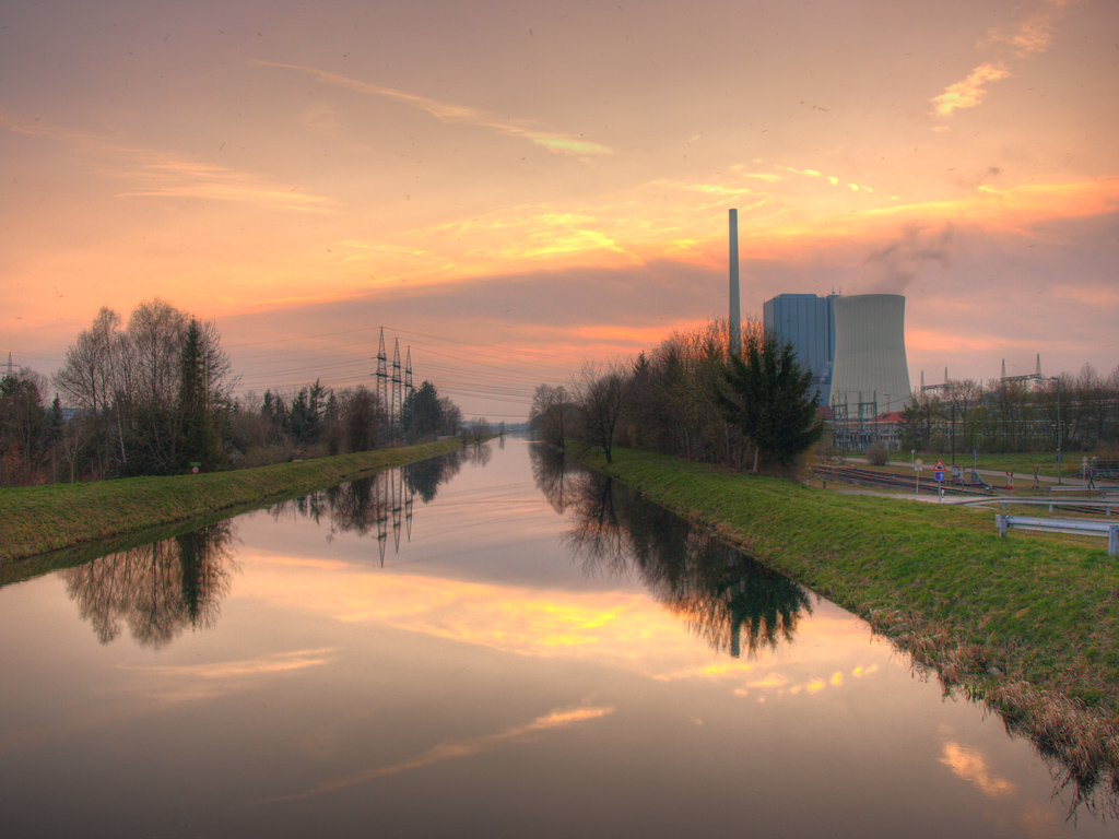 Kraftwerk Zolling und davor Umspannanlage Zolling, HDR